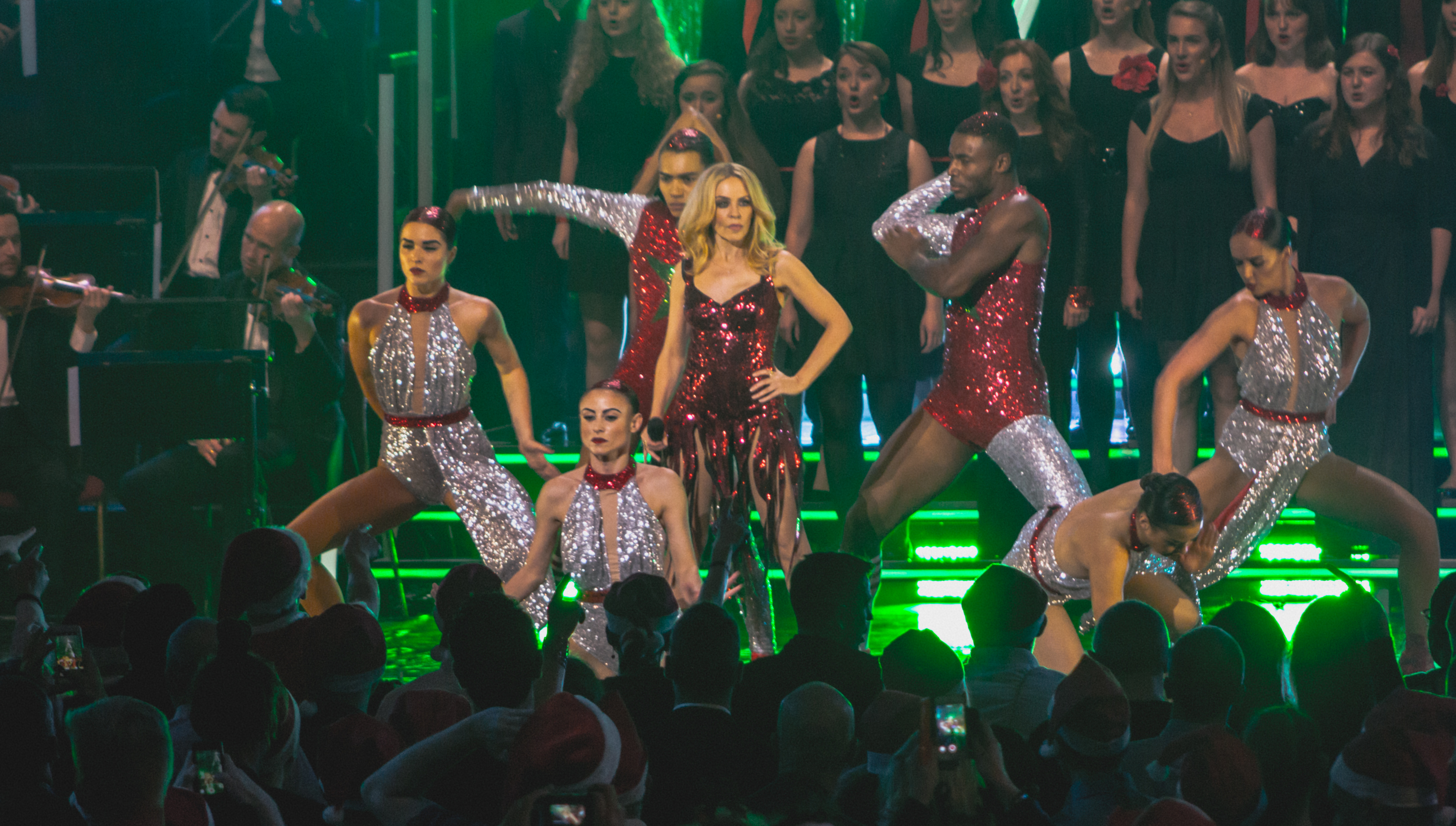 KylieRAH111215-30